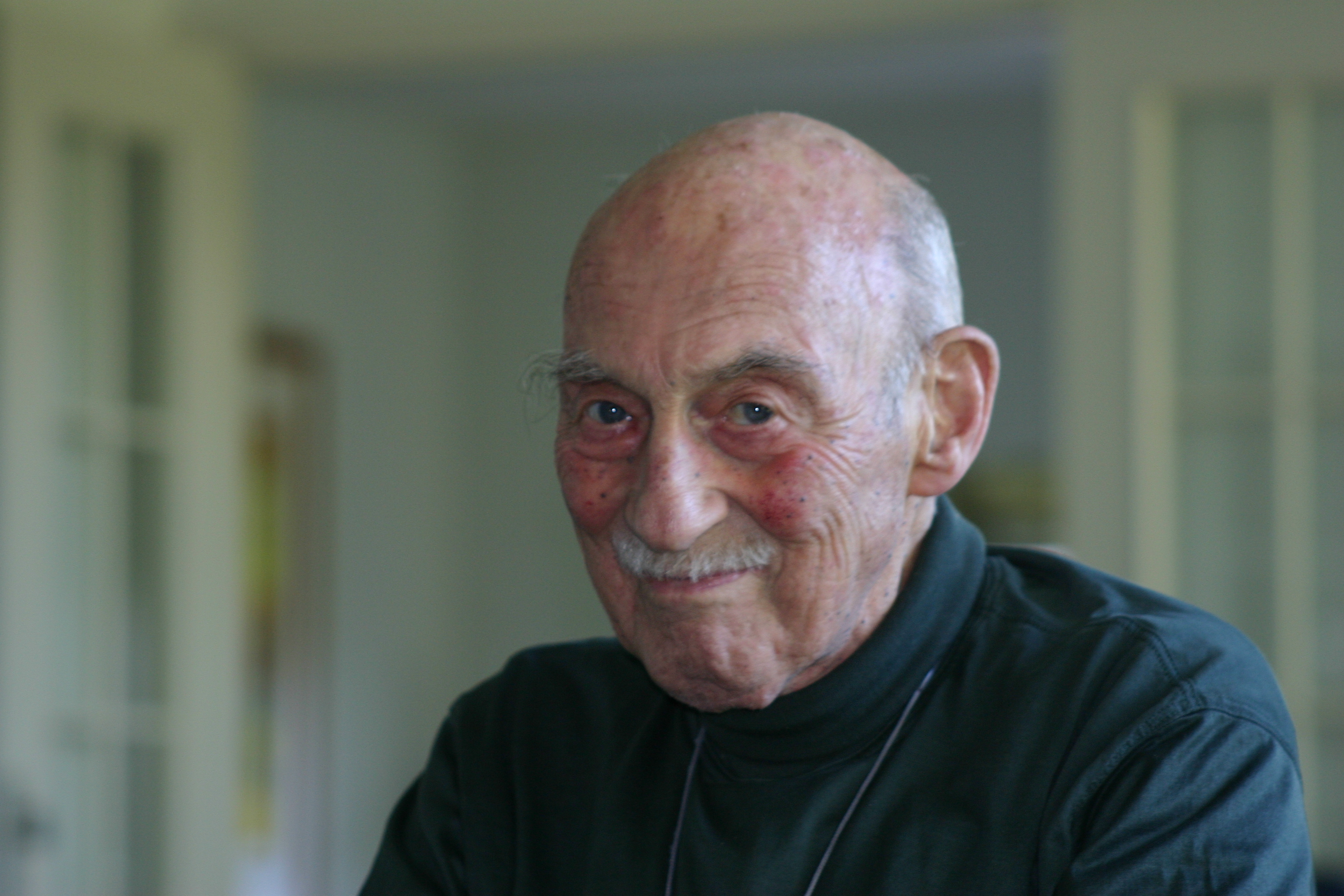 Bill Minco